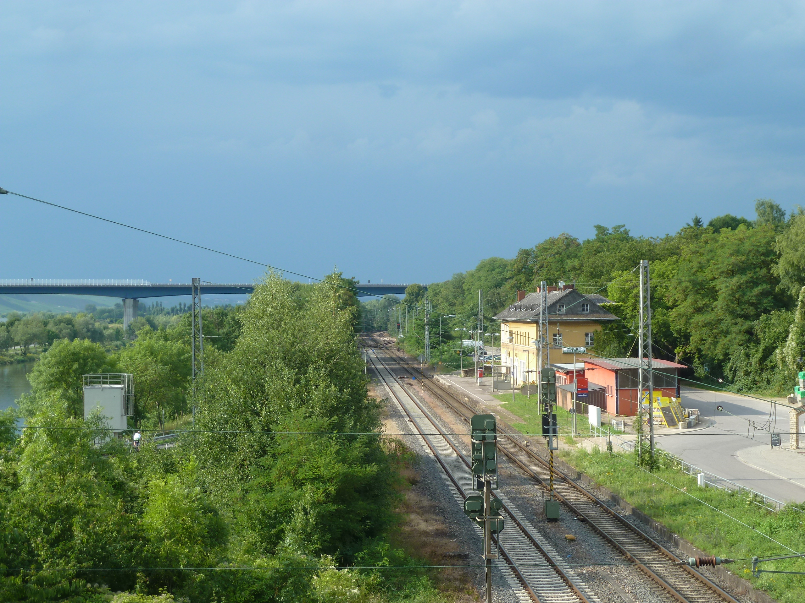 Bahnhof Perl, Überblick